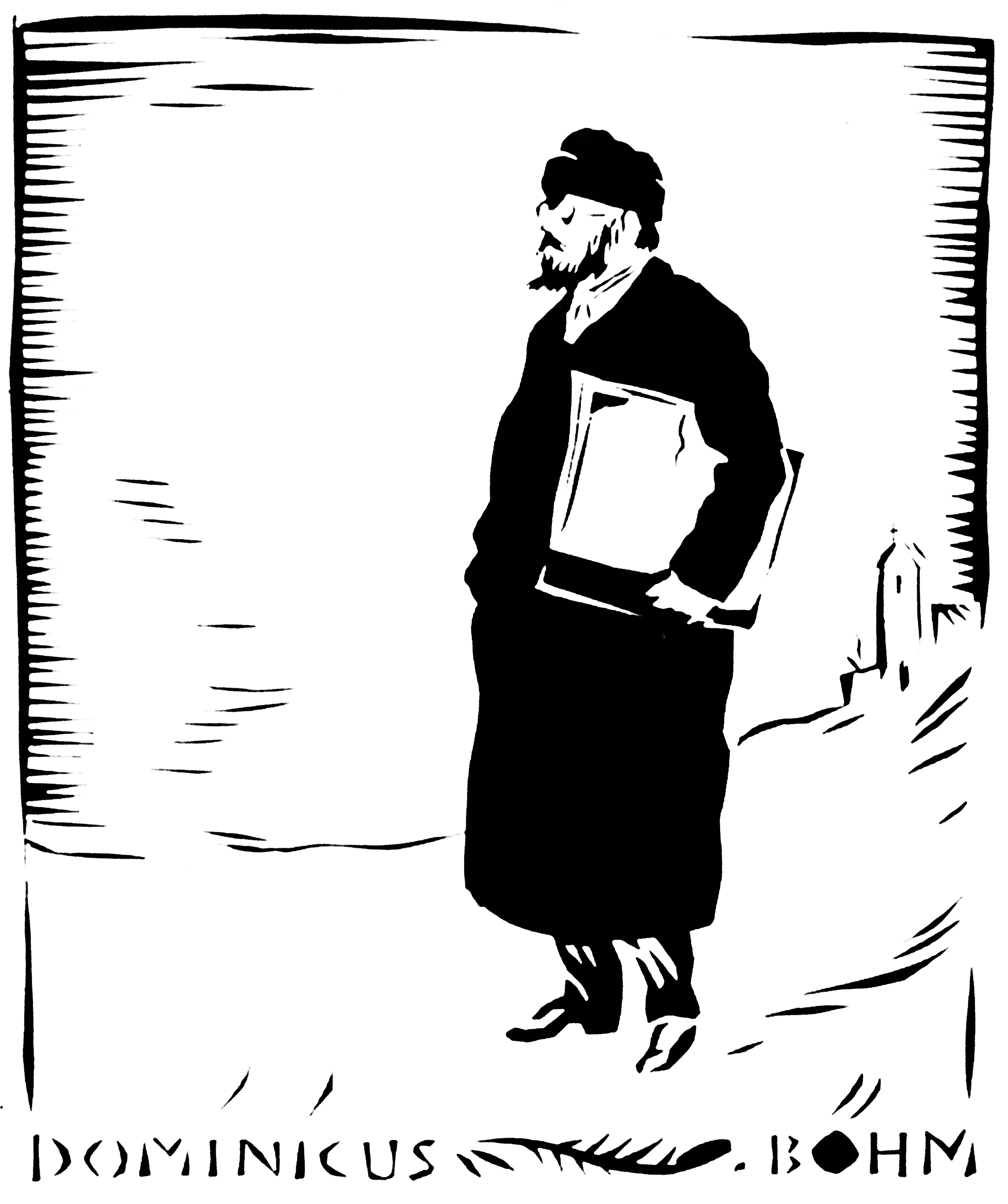 Scherenschnitt des Architekten Dominikus Böhm, Künstler: Rudolf Koch